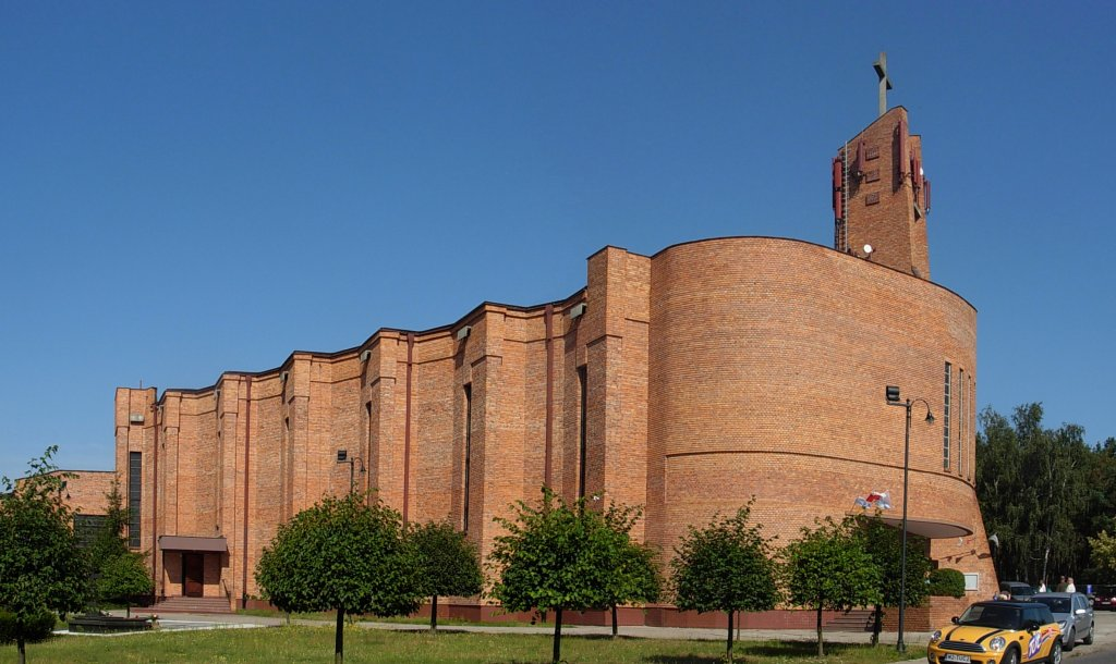 Kościół Matki Bożej Królowej Męczenników w Bydgoszczy